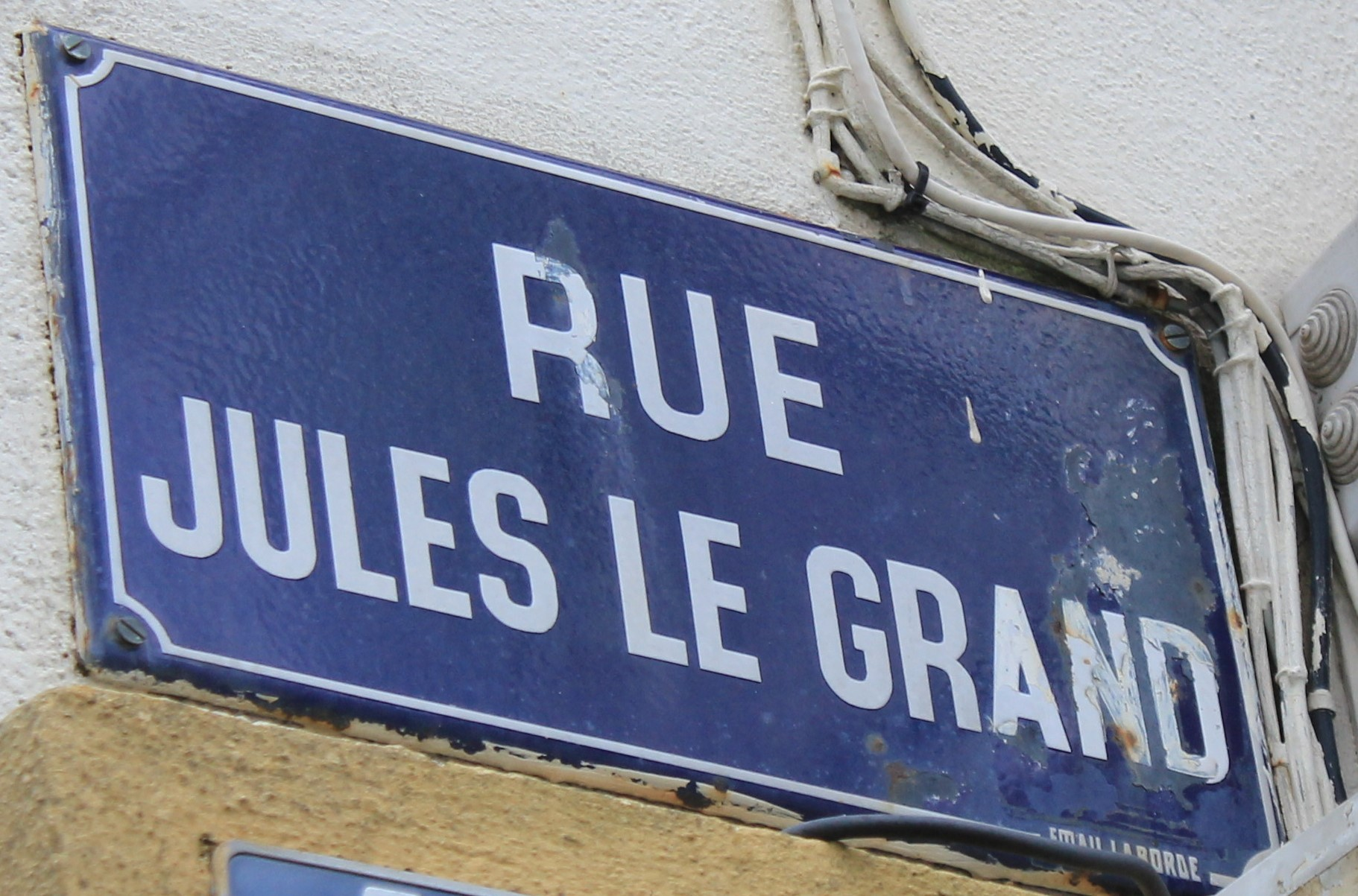 plaque de la rue Jules Legrand à Lorient